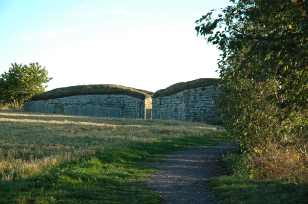 Nääs slottsruin, Visingsö Foto: Marcus Bornestav, 2005-10-15